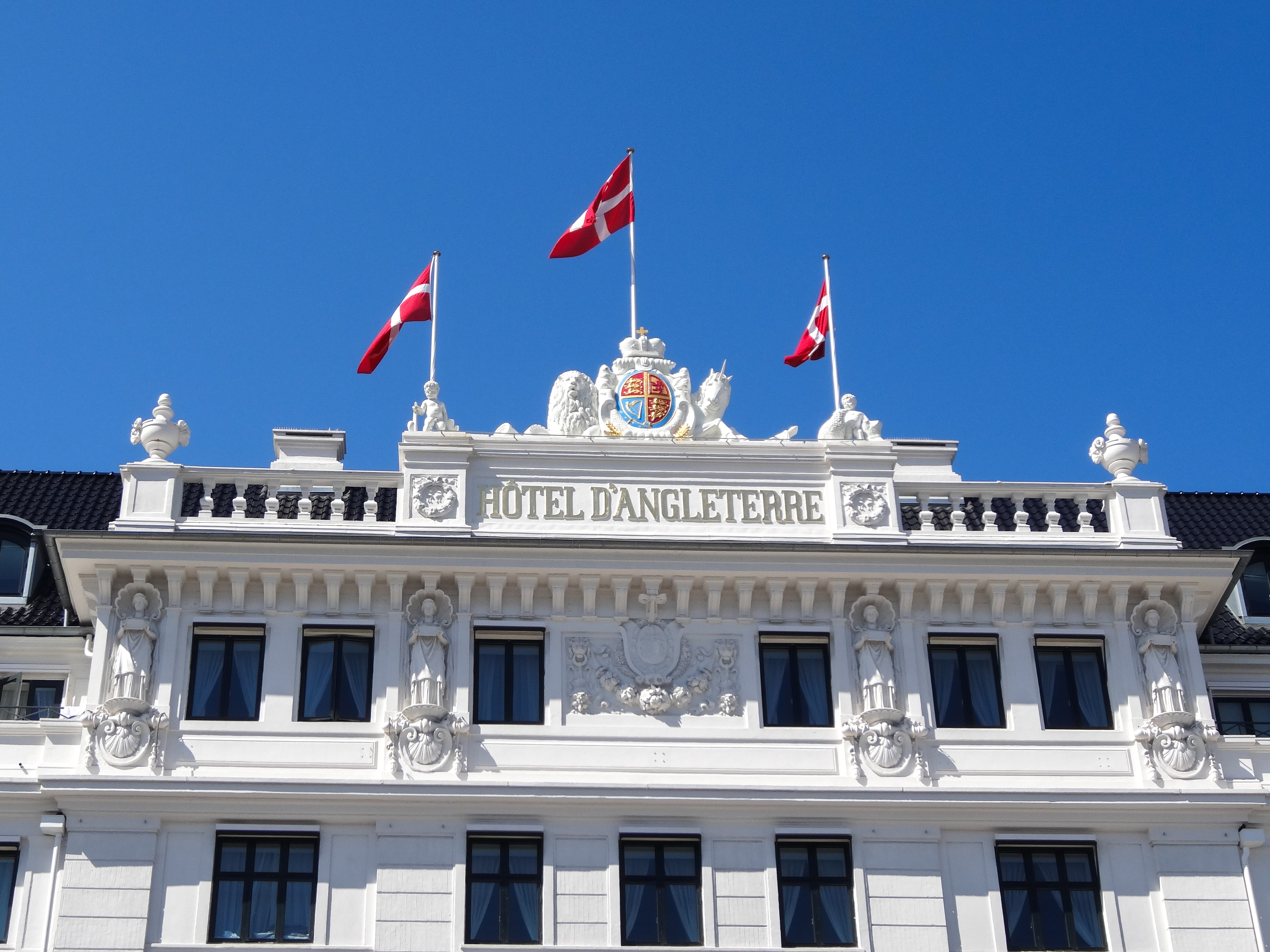 Detail from the Hotel d'Angleterre Building on Kongens Nytorv in Copenhagen, Denmark